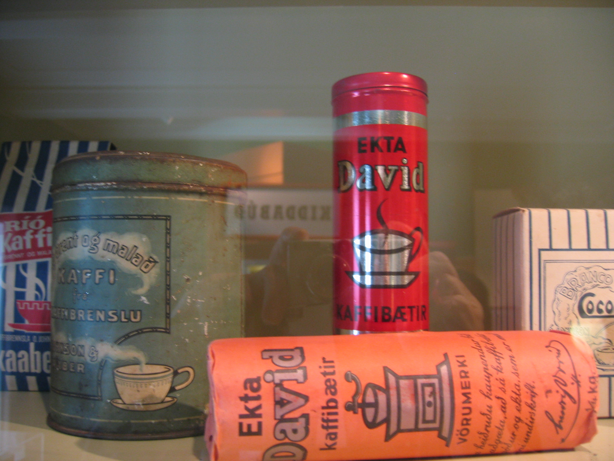 Kaffibætir coffee substitute